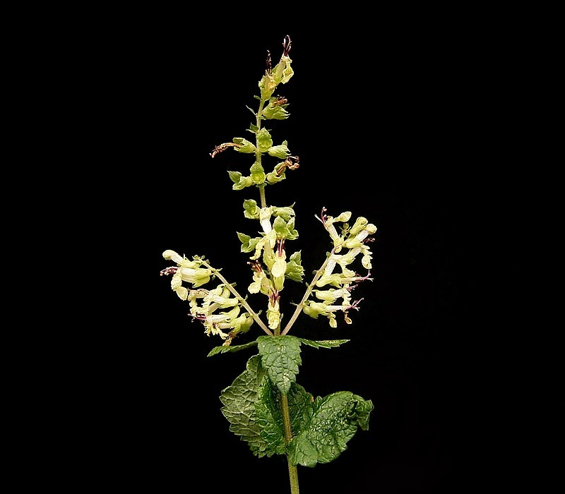 Teucrium scorodonia